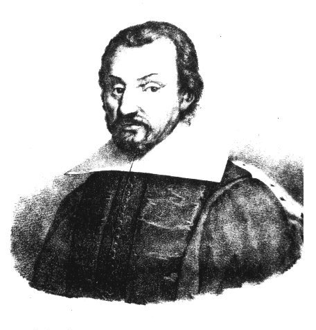 Dujet: Antoine Favre - ce portait appartient à une collection privée